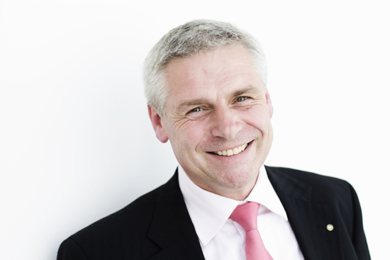 Mgr. Milan Šťovíček, poslanec, předseda pro výbor životního prostředí.